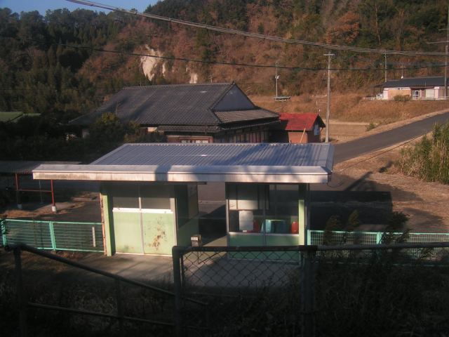 北俣駅 投稿者が撮影(2005/12/19)